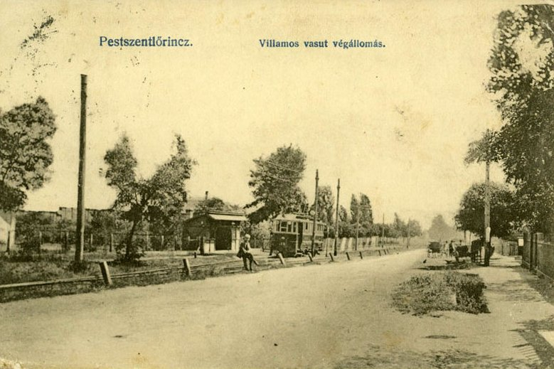 Pestszentlőrinc villamos végállomás